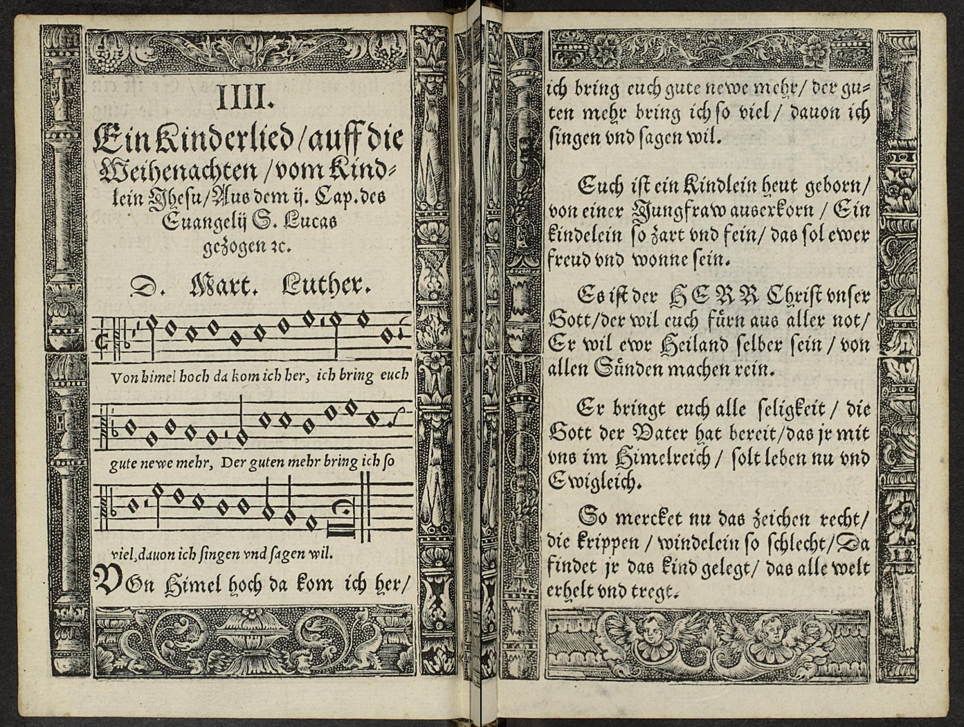 Gesangbuch of Martin Luther, double page of Christmas Carol Von Himmel hoch da komm' ich her, Valentin Bapst Erben, Leipzig